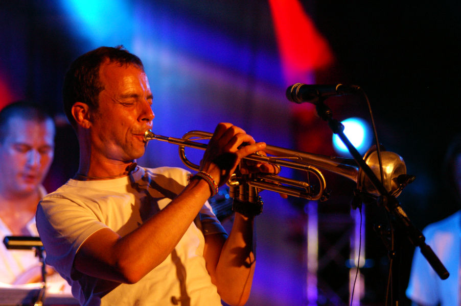 Joo Kraus